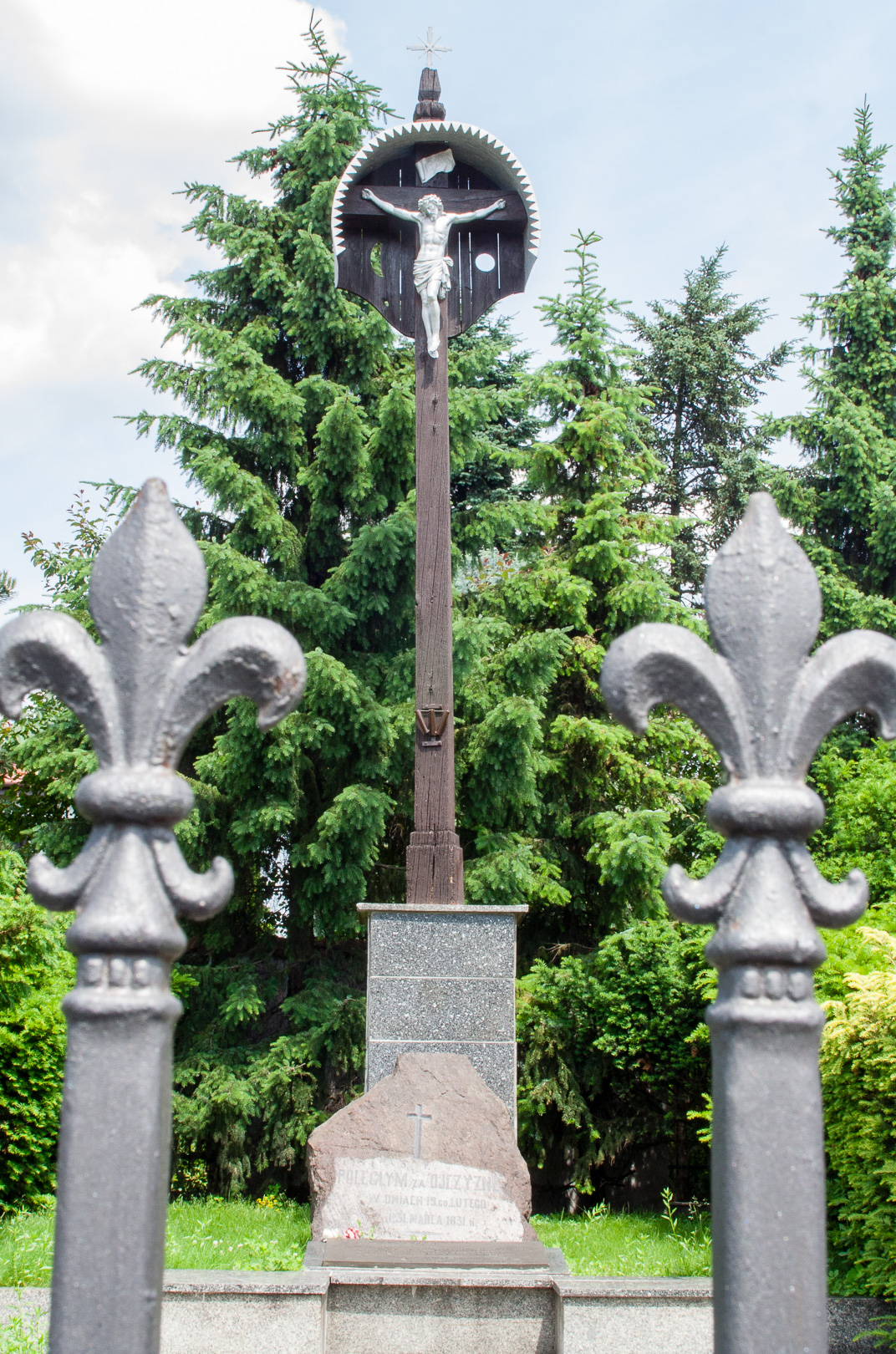 Drewniany krzyż poświęcony ofiarom powstania listopadowego i pamiątkowy głaz u jego stóp z wyrytym napisem, postawione tuż po odzyskaniu przez Polskę niepodległości w 1919 r. Warszawa Wawer. Napisy: kamień: Ś. + P. POLEGŁYM ZA OJCZYZNĘ W DNIACH 19.GO LUTEGO I.31.MARCA 1831.R. płyta poniżej: A JEŚLI KOMU DROGA OTWARTA DO NIEBA TYM CO SŁUŻĄ OJCZYŹNIE JAN KOCHANOWSKI W MOGILE TEJ SPOCZYWAJĄ PROCHY ŻOŁNIERZY POWSTANIA LISTOPADOWEGO POLEGŁYCH W ZWYCIĘSKICH BITWACH 19 LUTEGO I 31 MARCA 1831 R. W 170 ROCZNICĘ ZWYCIĘSTWA POD WAWREM 31 MARCA 2001 R. MIESZKAŃCY GMINY WARSZAWA WAWER Lokalizacja: M-y ul.Płowiecka 83 (Austerią Wawerską, Karczmą Wawerską, tuż przy murze) a ul. Płowiecka 85.